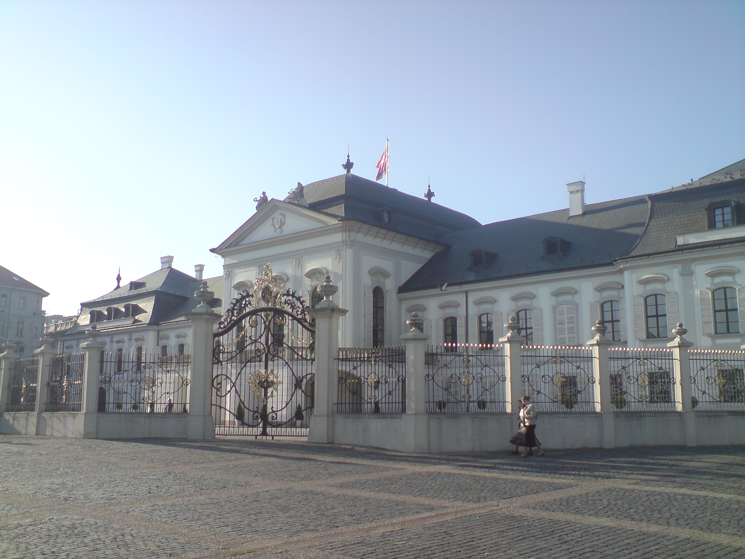 Grasalkovičov palác, Hodžovo námestie, Bratislava